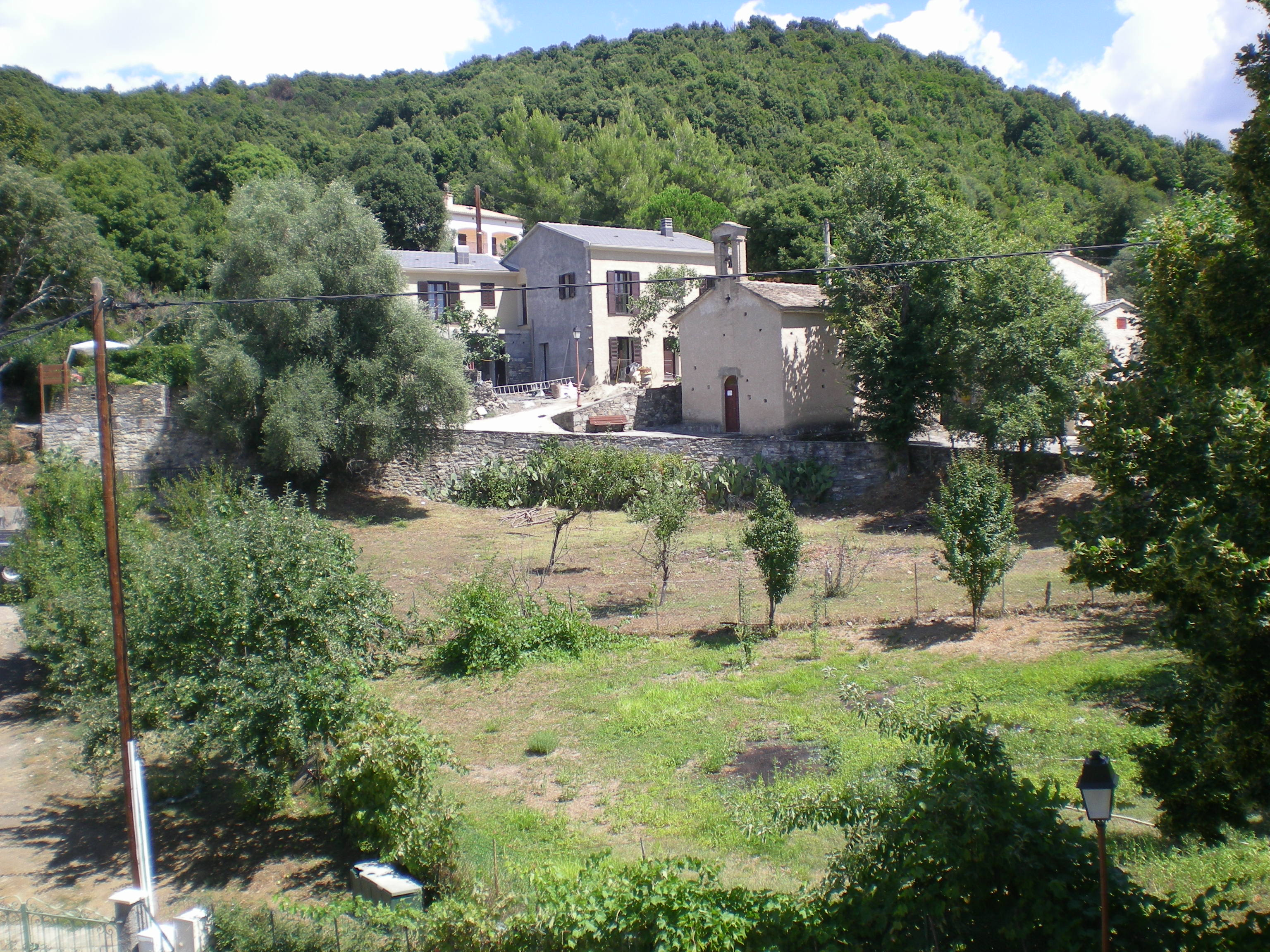 Eglise Santa Maria Assunta de Favalello di Bozio